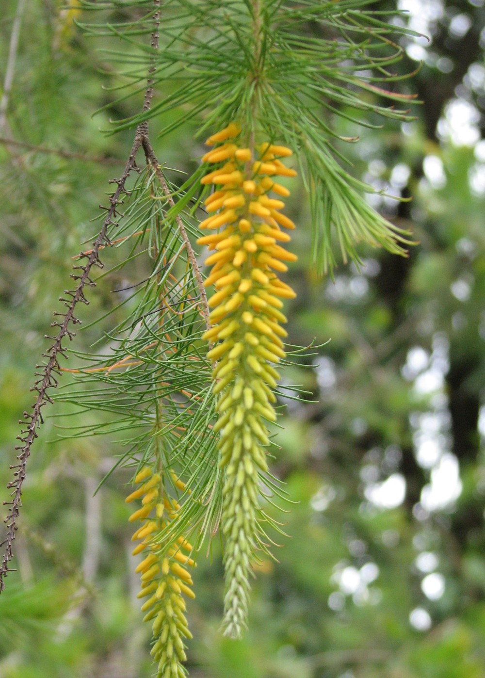 Persoonia pinifolia, Maranoa Gardens, Balwyn, Victoria, Australia.